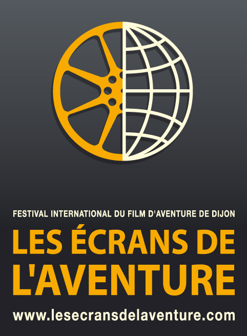 Un logo conçu par